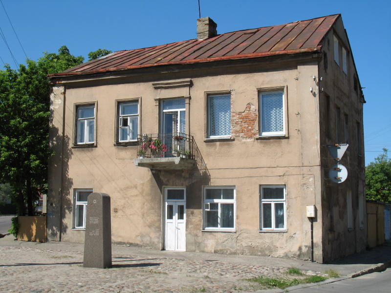 Kauno getas, paminklas prie buvusių įėjimo vartų į getą.